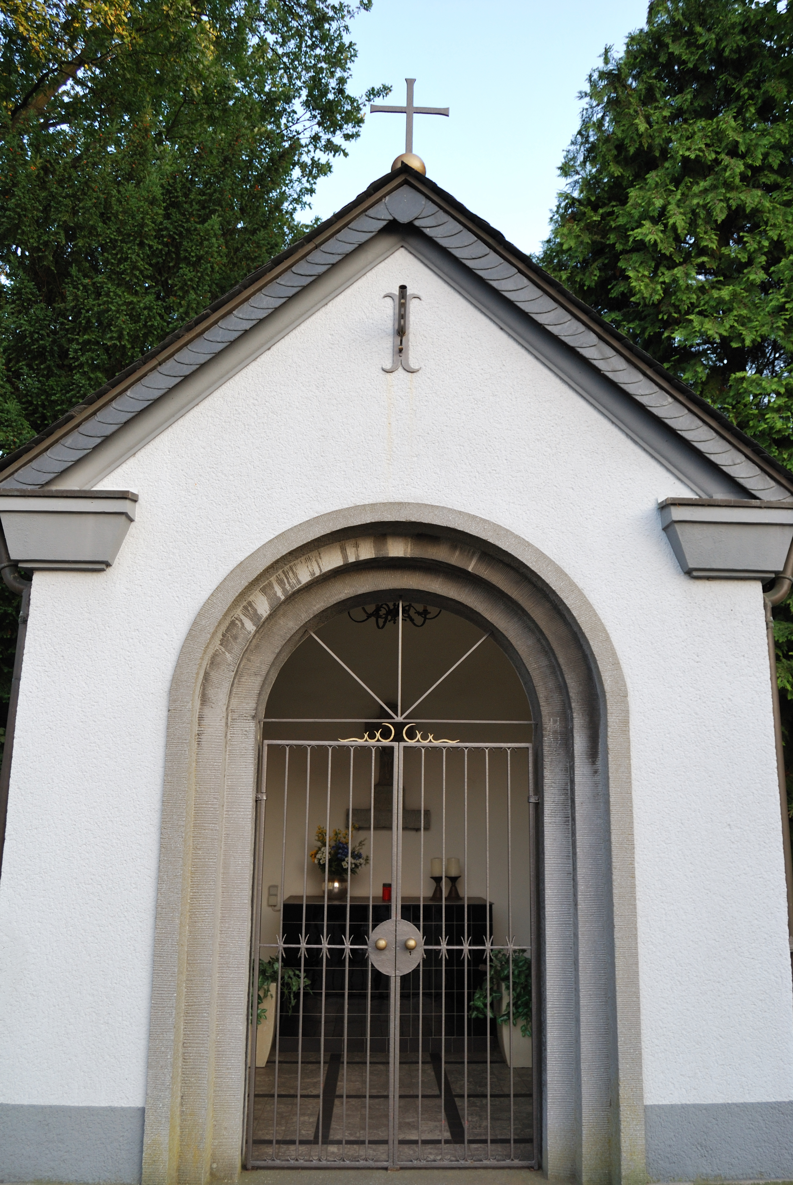 Alpenstraße/Ecke FortunastraßeThis is a photograph of an architectural monument.